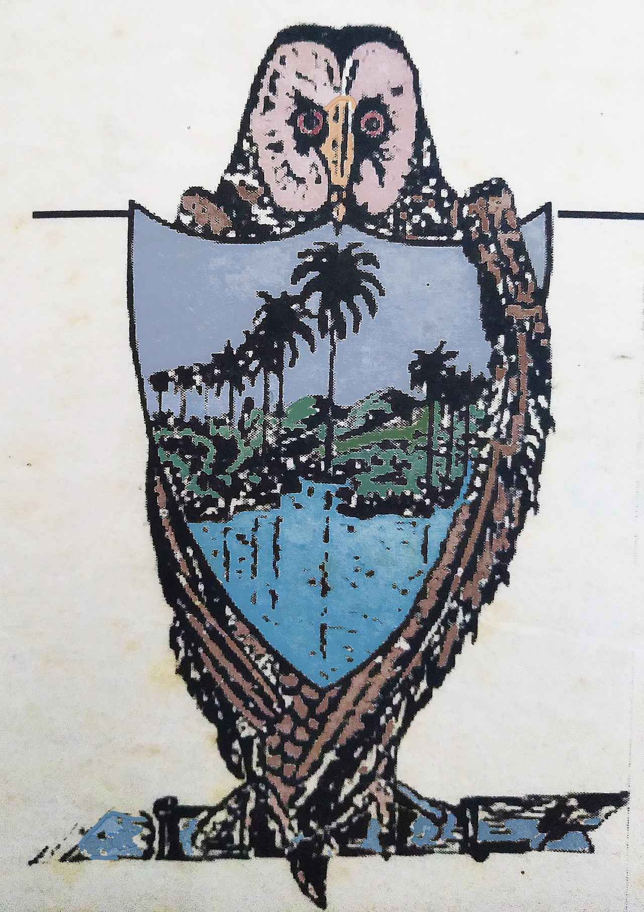 Rodas